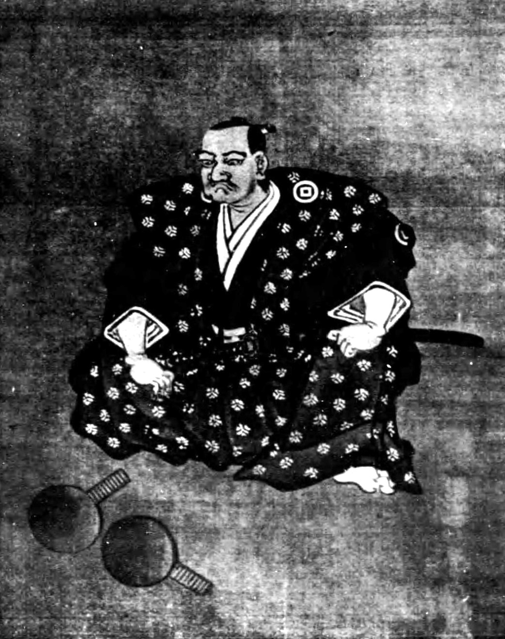 青山忠俊の肖像。